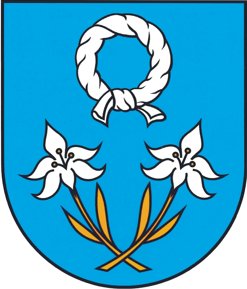 Herb gminy Lniano